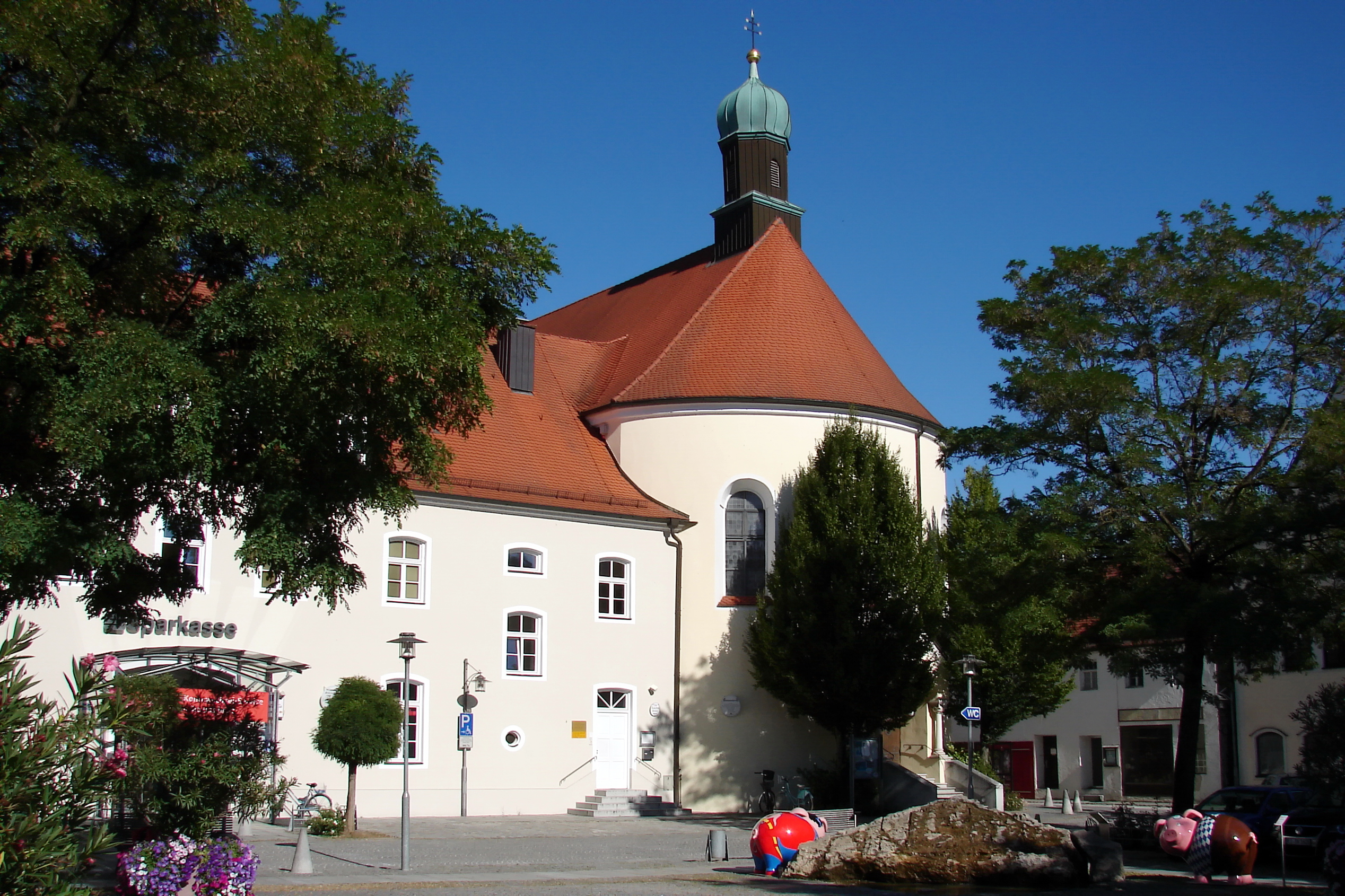 Ehemalige Klosterkirche, jetzt katholische Filialkirche St. Antonius.